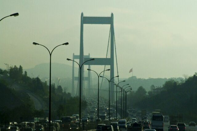 Fatih Sultan Mehmet Bridge